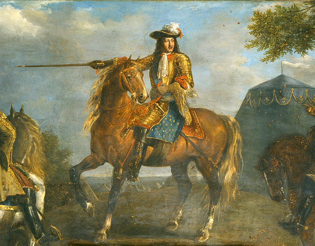 Vue partielle et centrale du tableau montrant Louis XIV à cheval